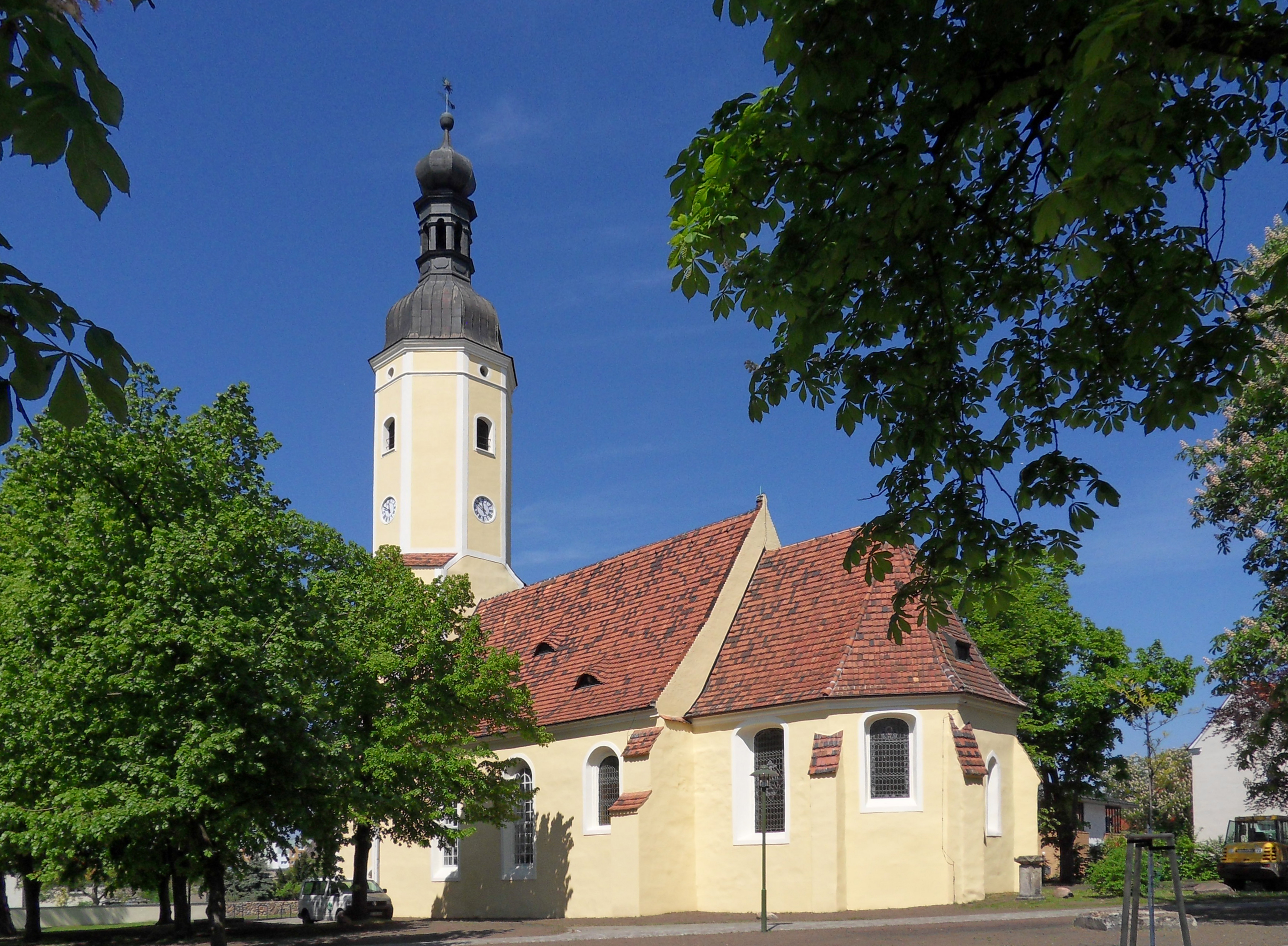 Denkmalgeschützte evangelische Kirche am Dietrich-Heßmer-Platz in Lauchhammer-Mitte